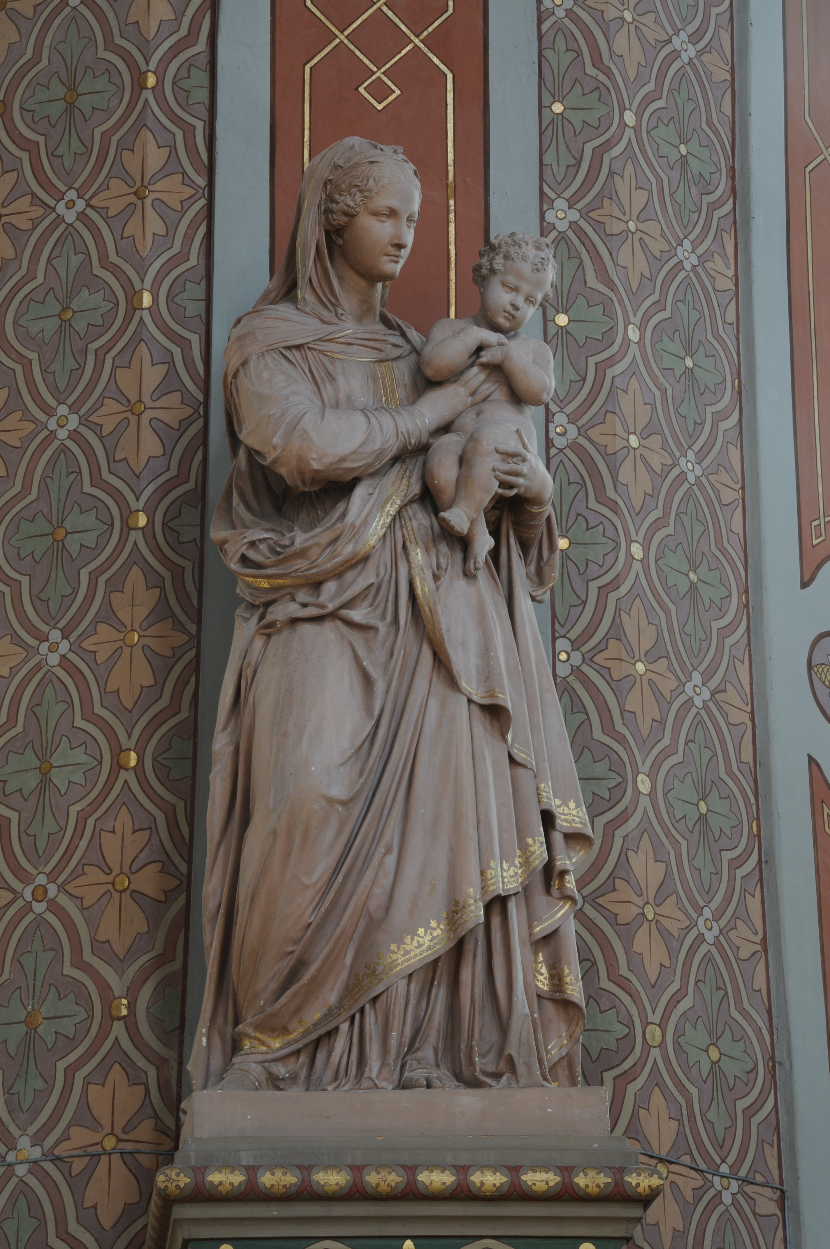 Matthew evangelist by J.D. Mahlknecht in the parish church in Urtijei, St. Ulrich in Gröden - Ortisei Val Gardena